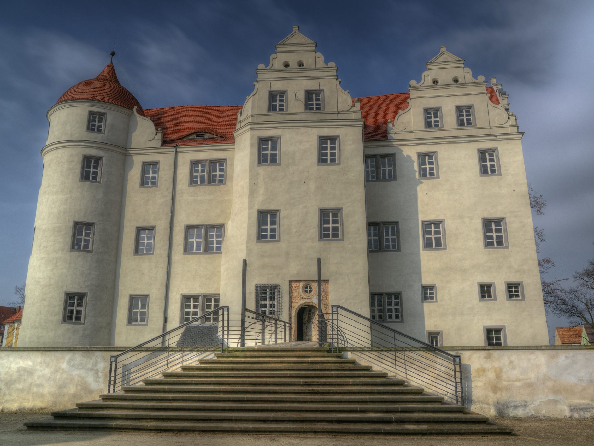 Schlossansicht von vorne